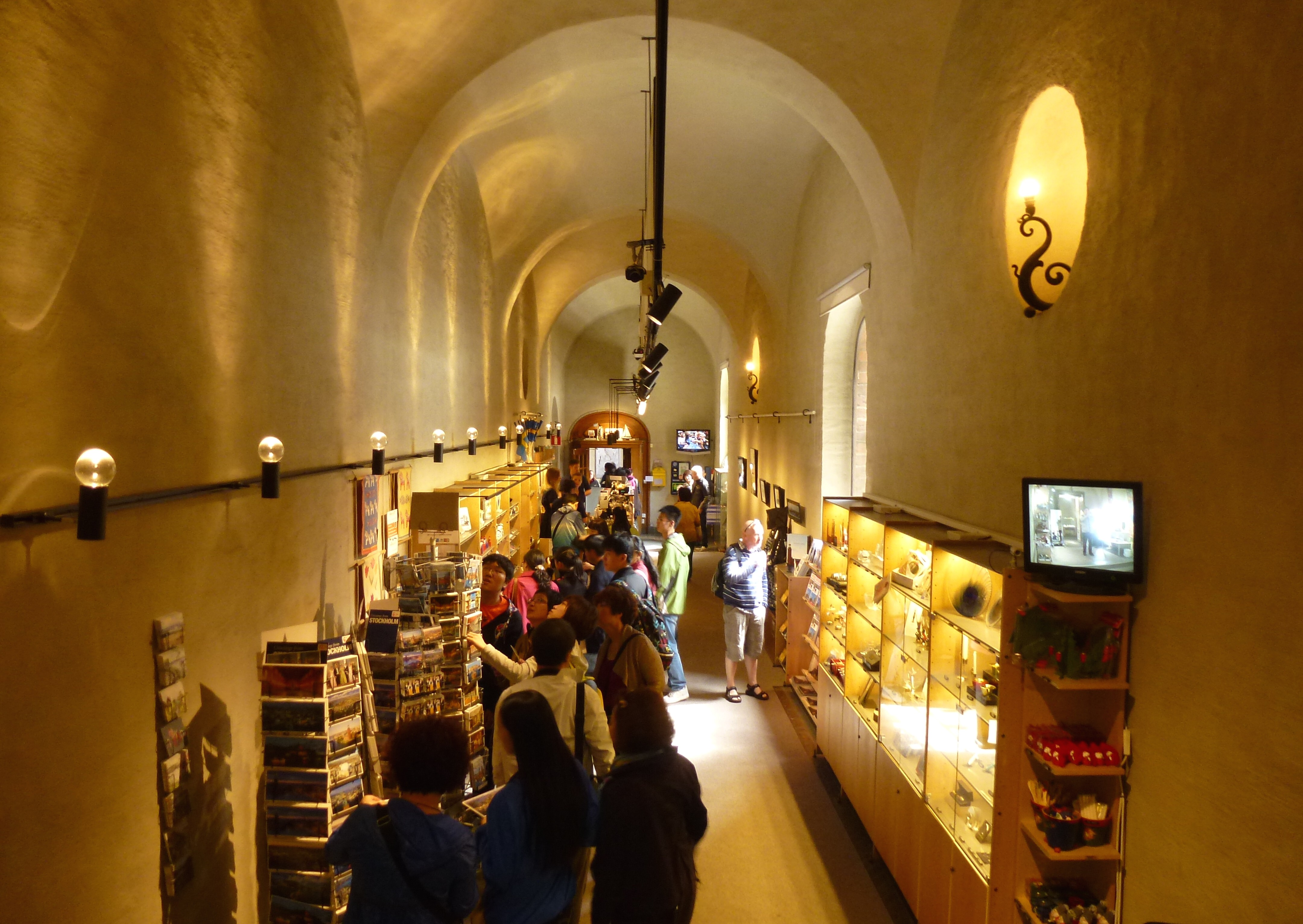 Stadshusshoppen i Stockholms Stadshus